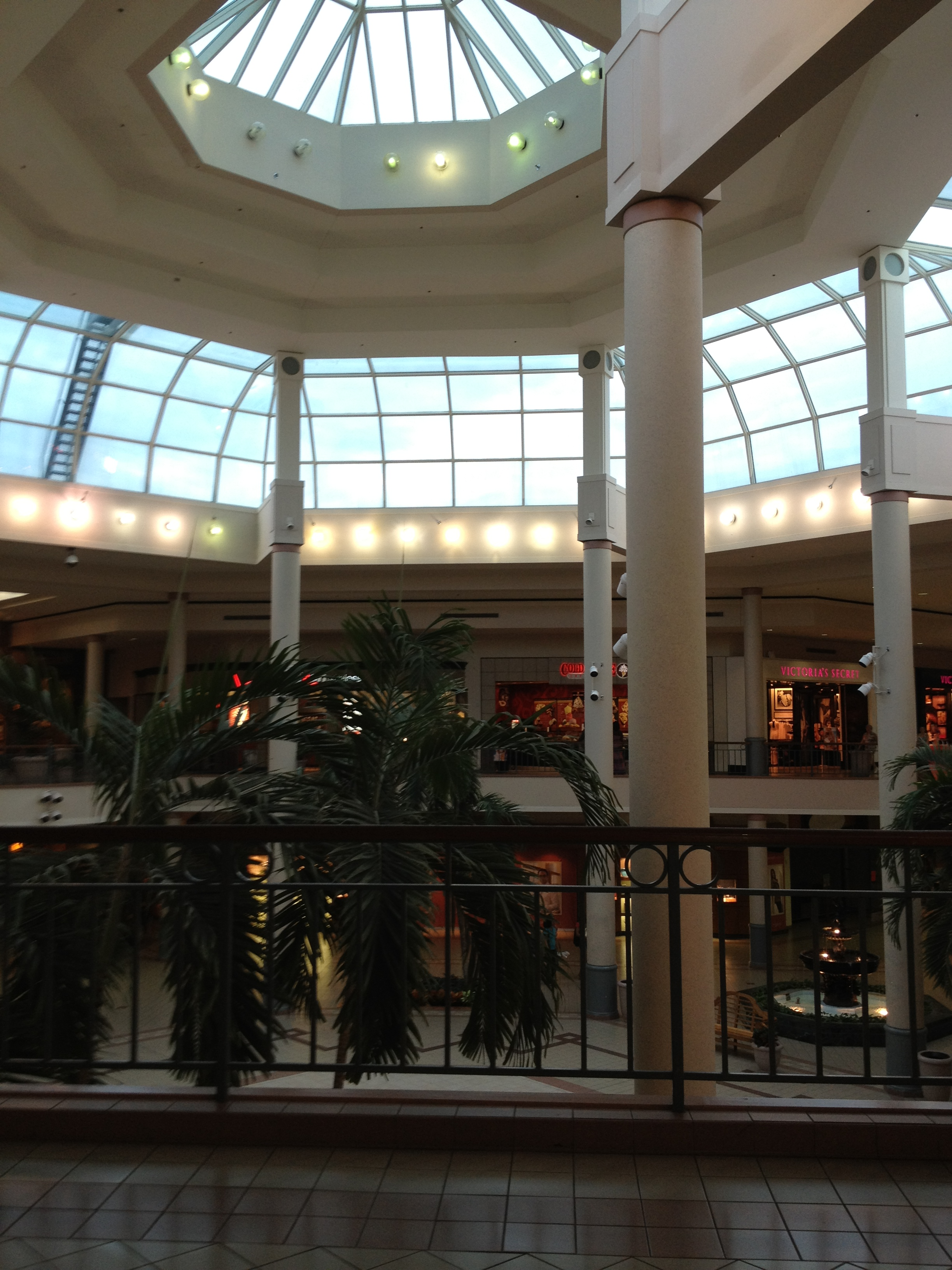 Savannah Mall